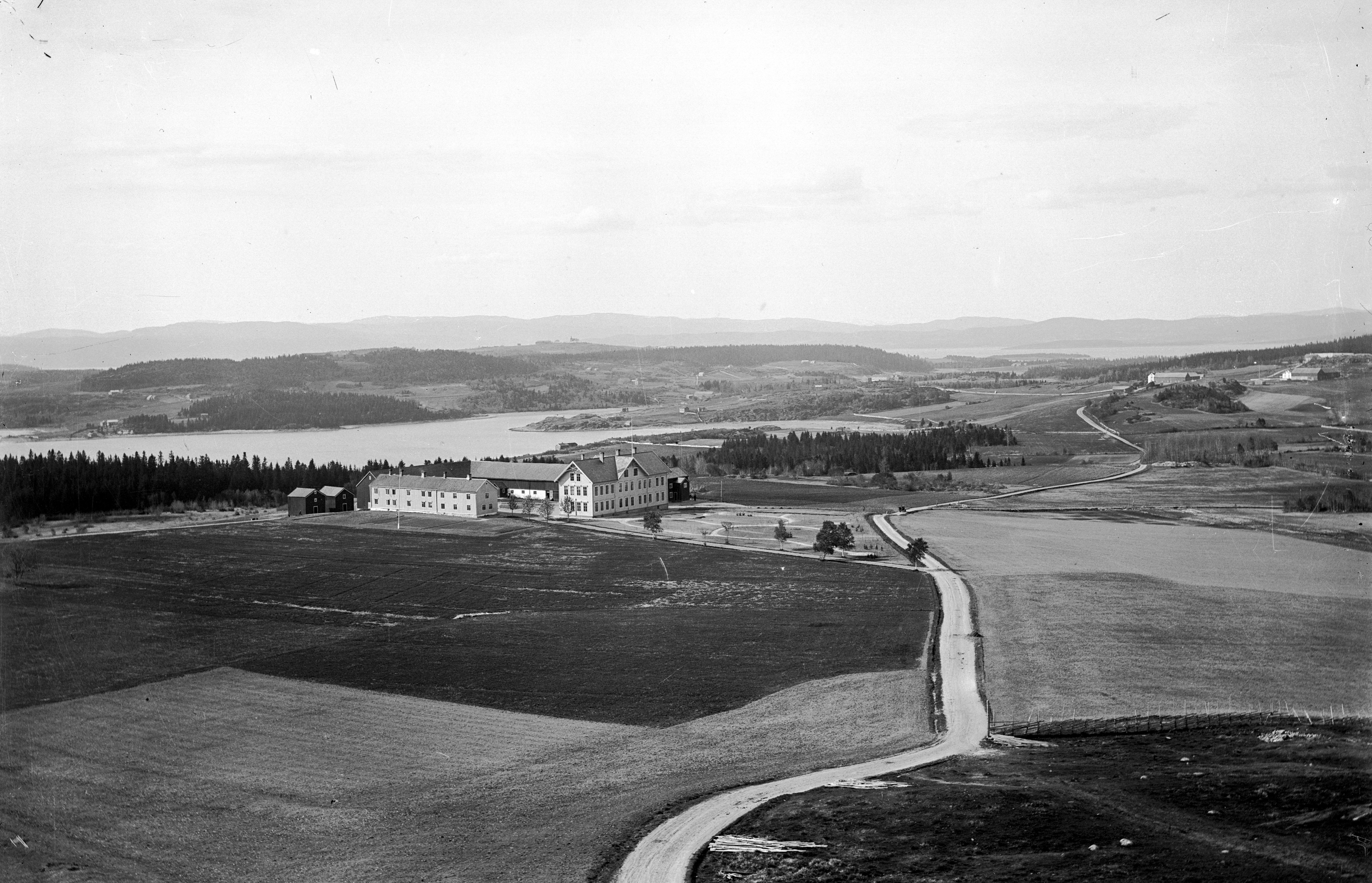 Amtlandbruksskolen på Mære startet 1. november 1895. Skolen var både for gutter og jenter. På Nedre Mære gård ble det reist ny hovedbygning til åpningen, en tredje hovedbygning kom til i 1911. De første årene drev skolen med nydyrking, dessuten ble Mæresmyra drenert og dyrket. I 1908 hadde skolen 500 mål dyrket jord, 700 mål udyrket mark og 65 elever.